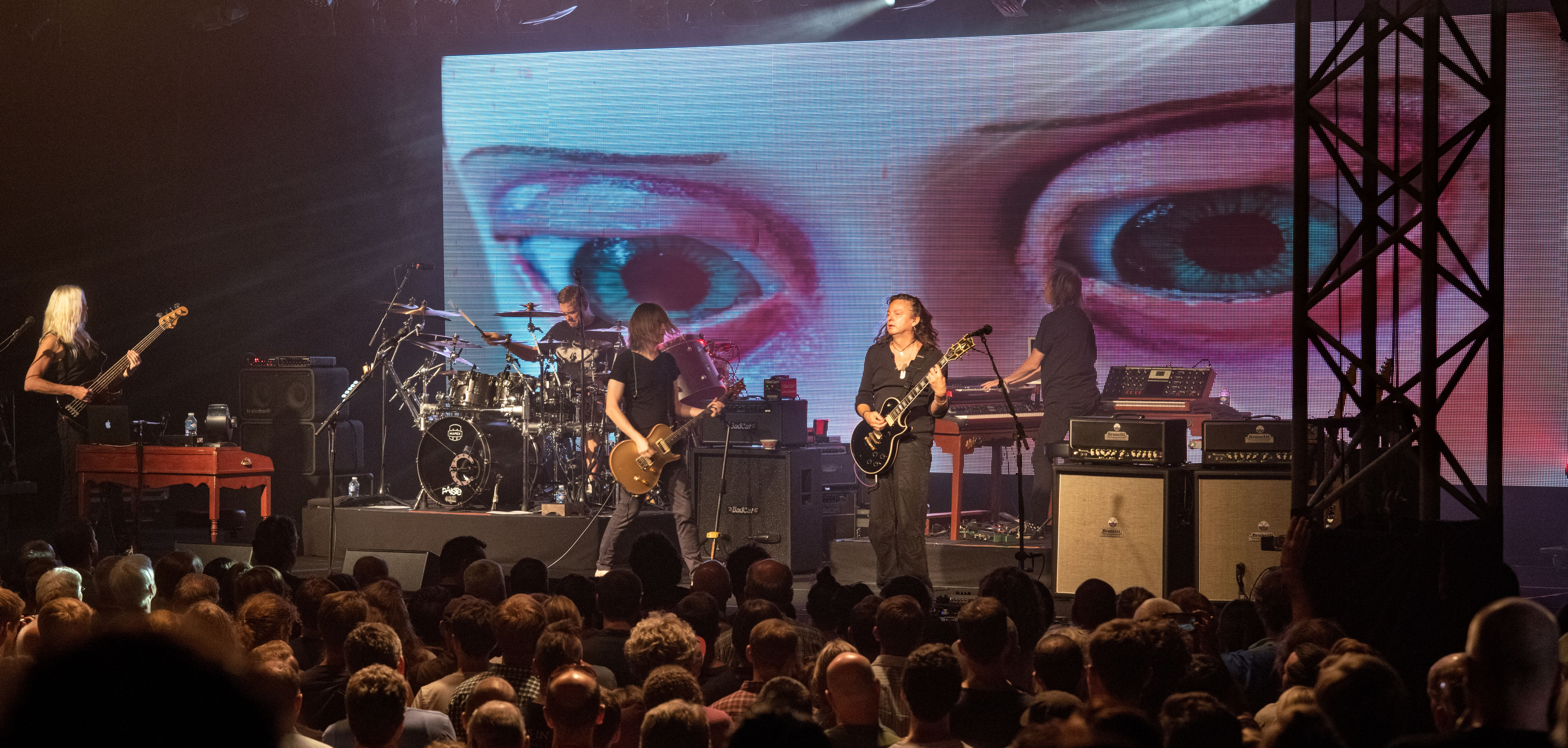 Bilder vom Zelt Musik Festival 2016 in Freiburg im Breisgau Steven Wilson